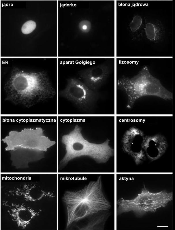 examples for subcellular localisations - polish description